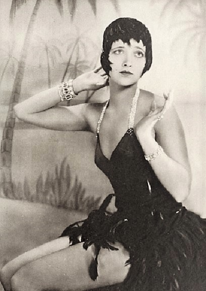 Kay Francis